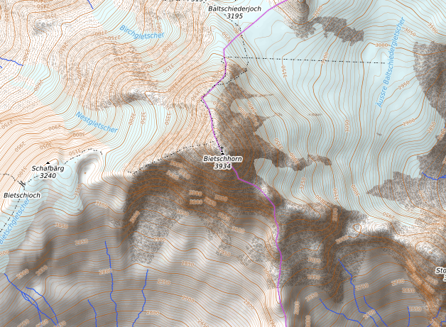 carte réalisée sur umap This map may be incomplete, and may contain errors. Don't rely solely on it for navigation.